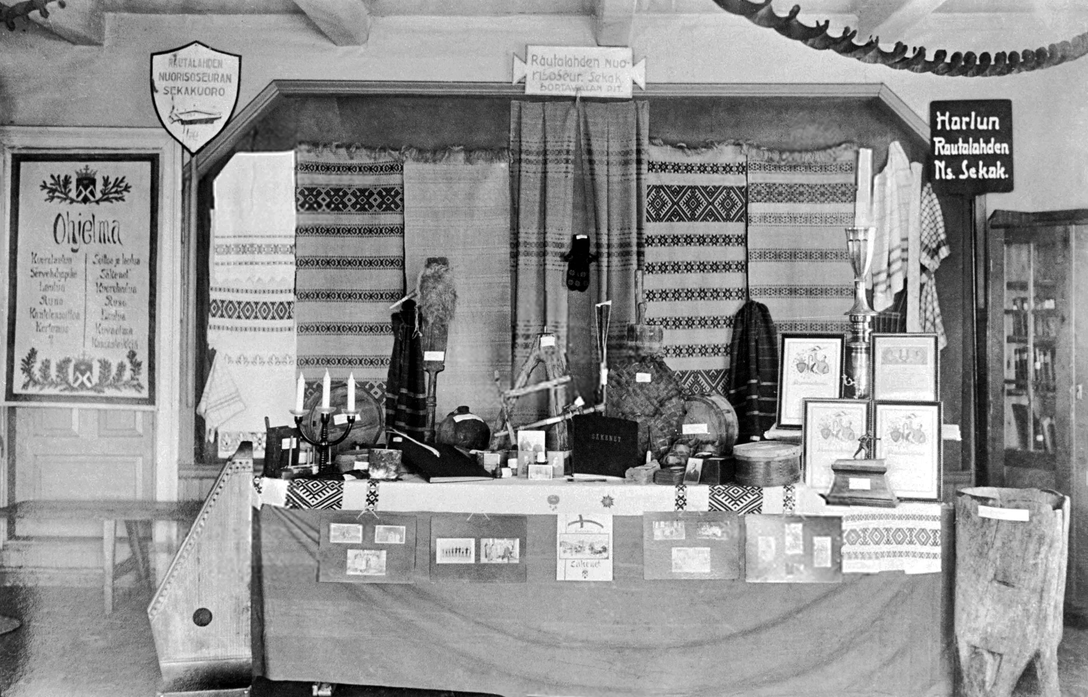 Краеведческий музей волости Харлу, 1930-е годы.